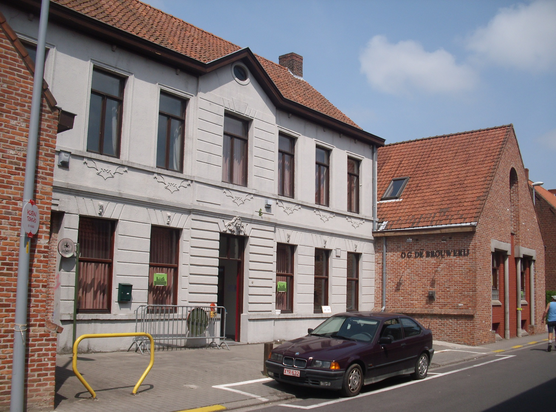 De straatzijde van Brouwerij De Geest - Ieperstraat - Moorsele - Wevelgem - West-Vlaanderen - België